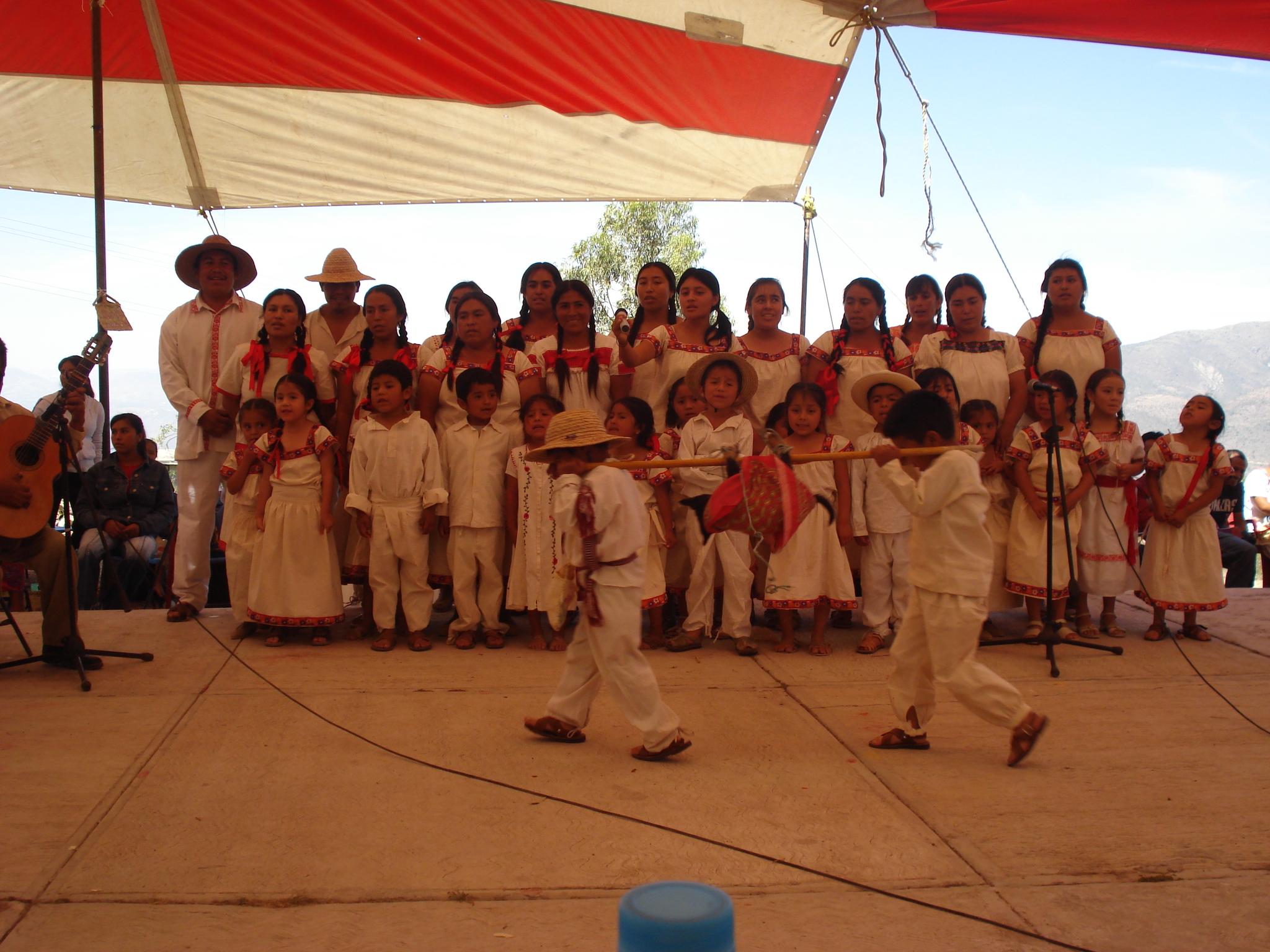 Cantos indígenas en lengua Hñahñu en el Valle del Mezquital